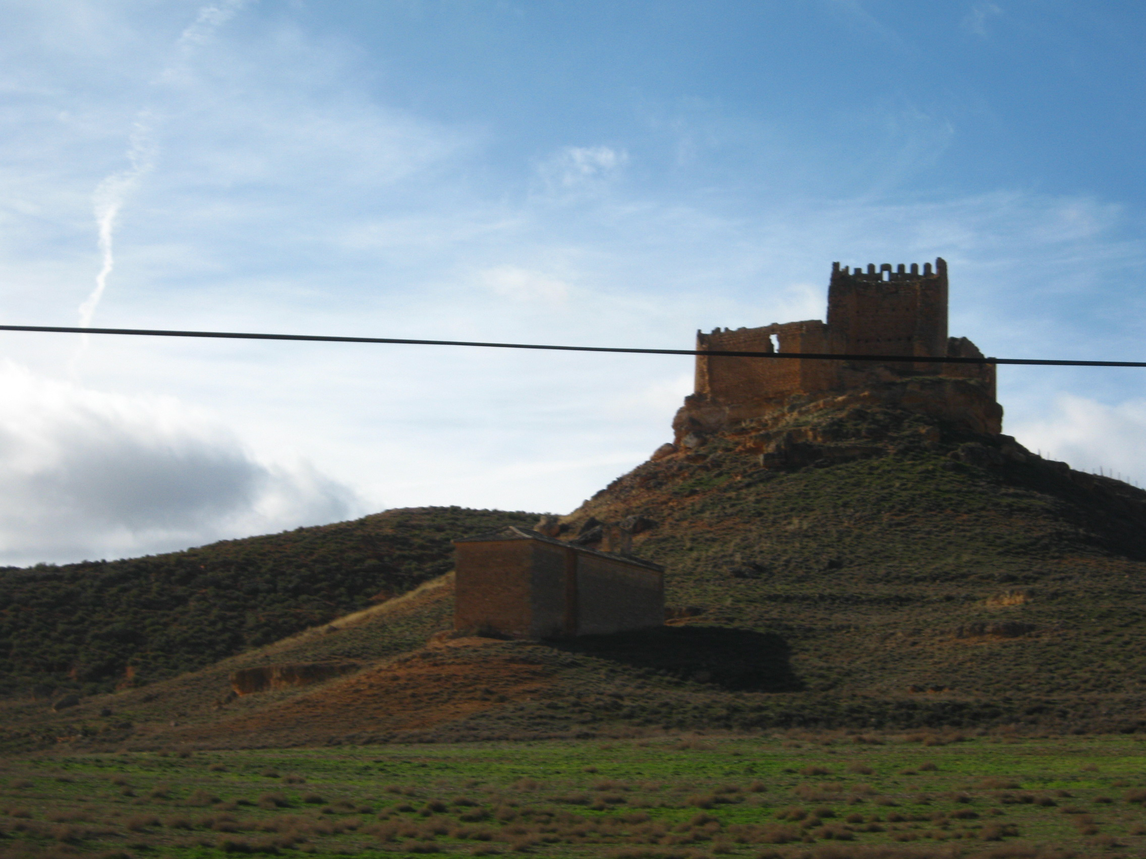 Torre de Martín González y ermita de Ntra. Sra. de la Torre